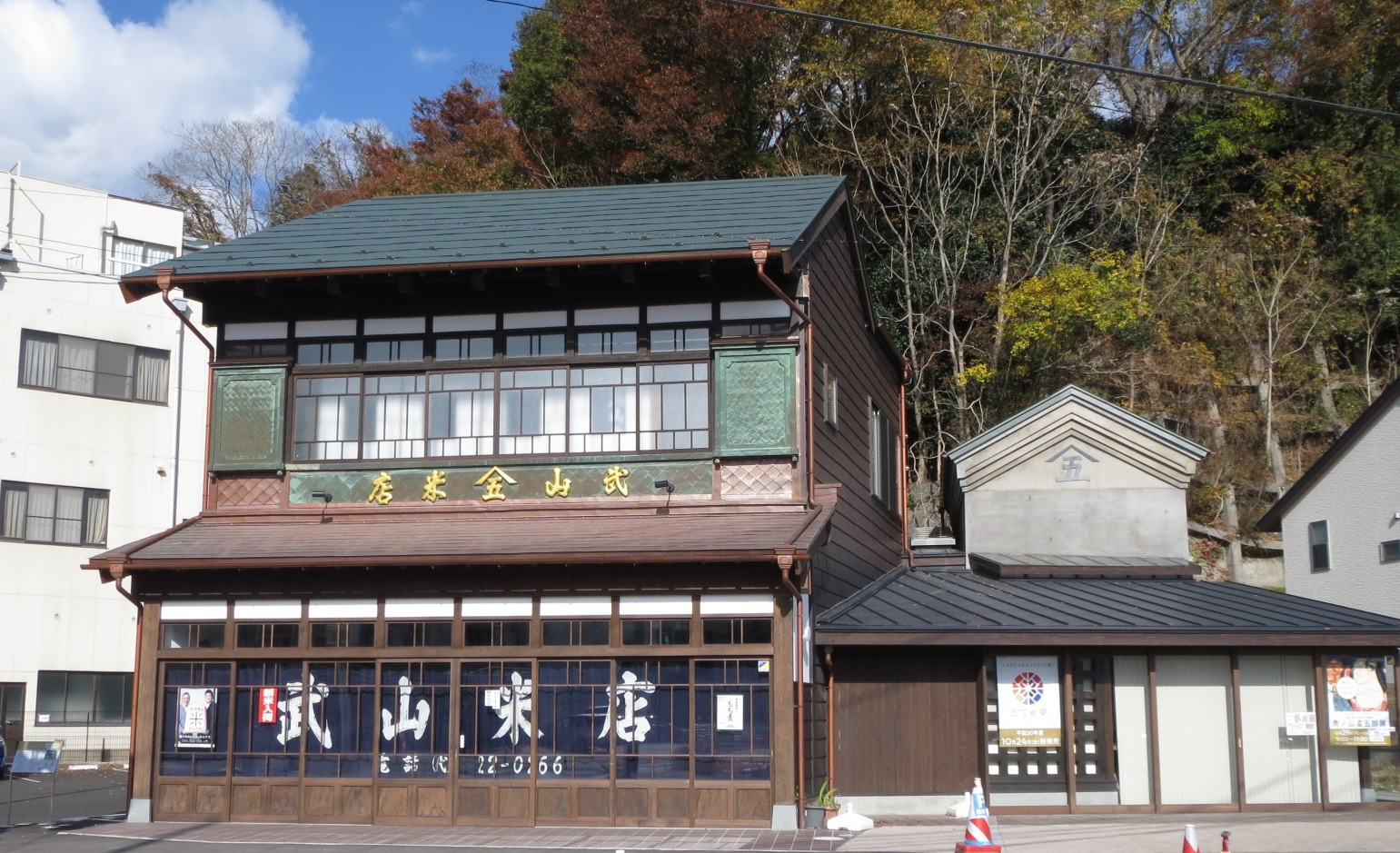 武山炊飯博物館